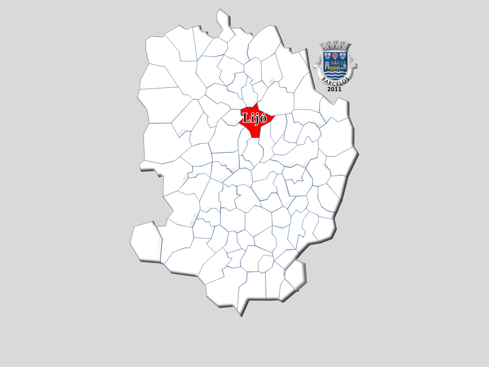 Censos 1964/2011